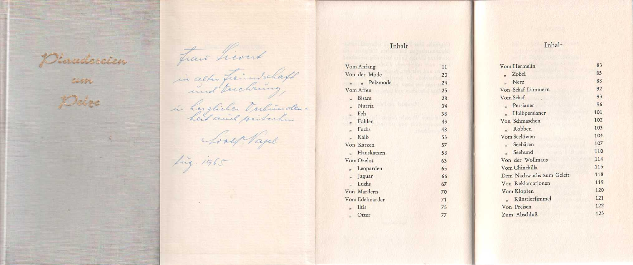 Adolf Nagel (Kürschnermeister in Düsseldorf): Plaudereien um Pelze. Lyrik zum Thema Pelz. Herstellung: Michelpresse, Düsseldorf Frühjahr 1965 Leinen, 122 Seiten, 11 x 18,5 cm HRA 4653: Adolf Nagel, Düsseldorf. Das Handelsgeschäft ist im Wege des Rechtsgeschäfts auf Rolf Boucher, Kürschnermeister, Nürnberg, übergegangen. (1964)